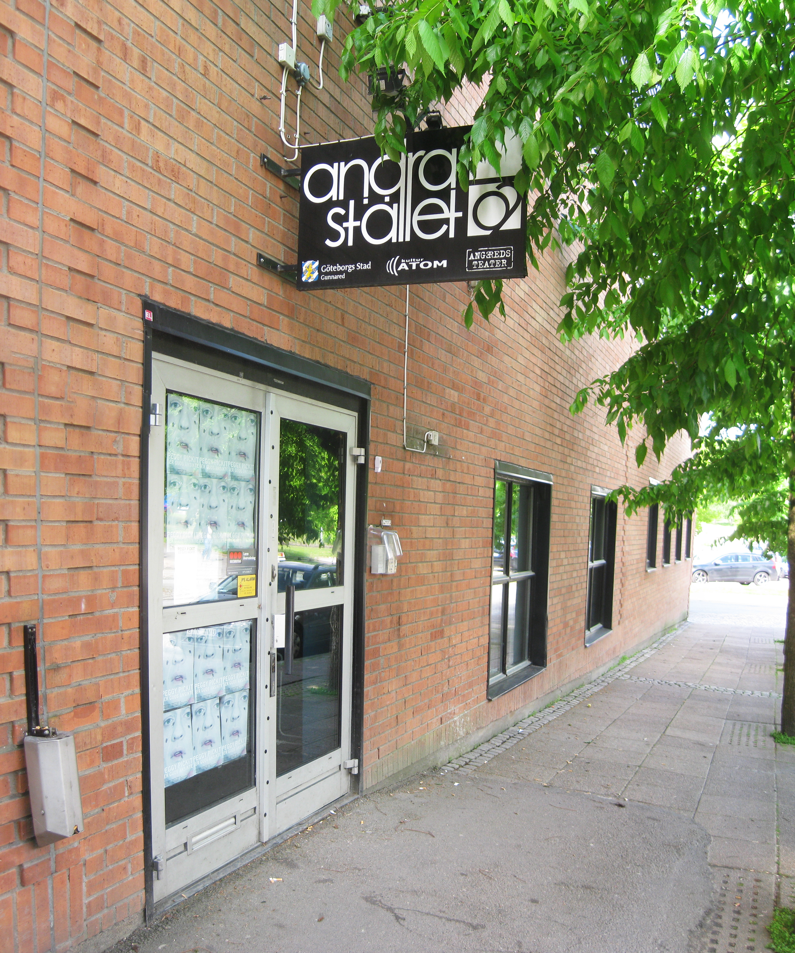 Entrén till "Andra Stället" i Angered.